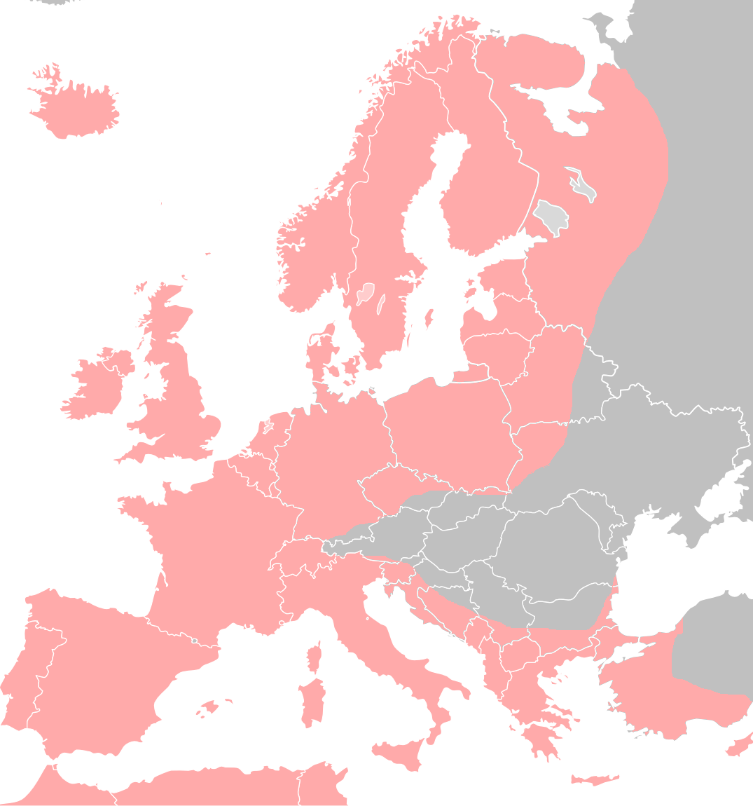 Přibližná mapa výskytu úhoře říčního